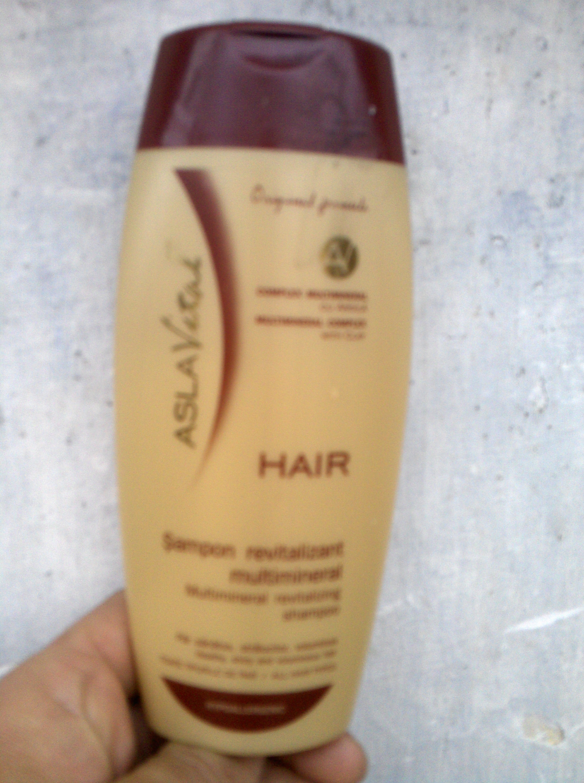 champu